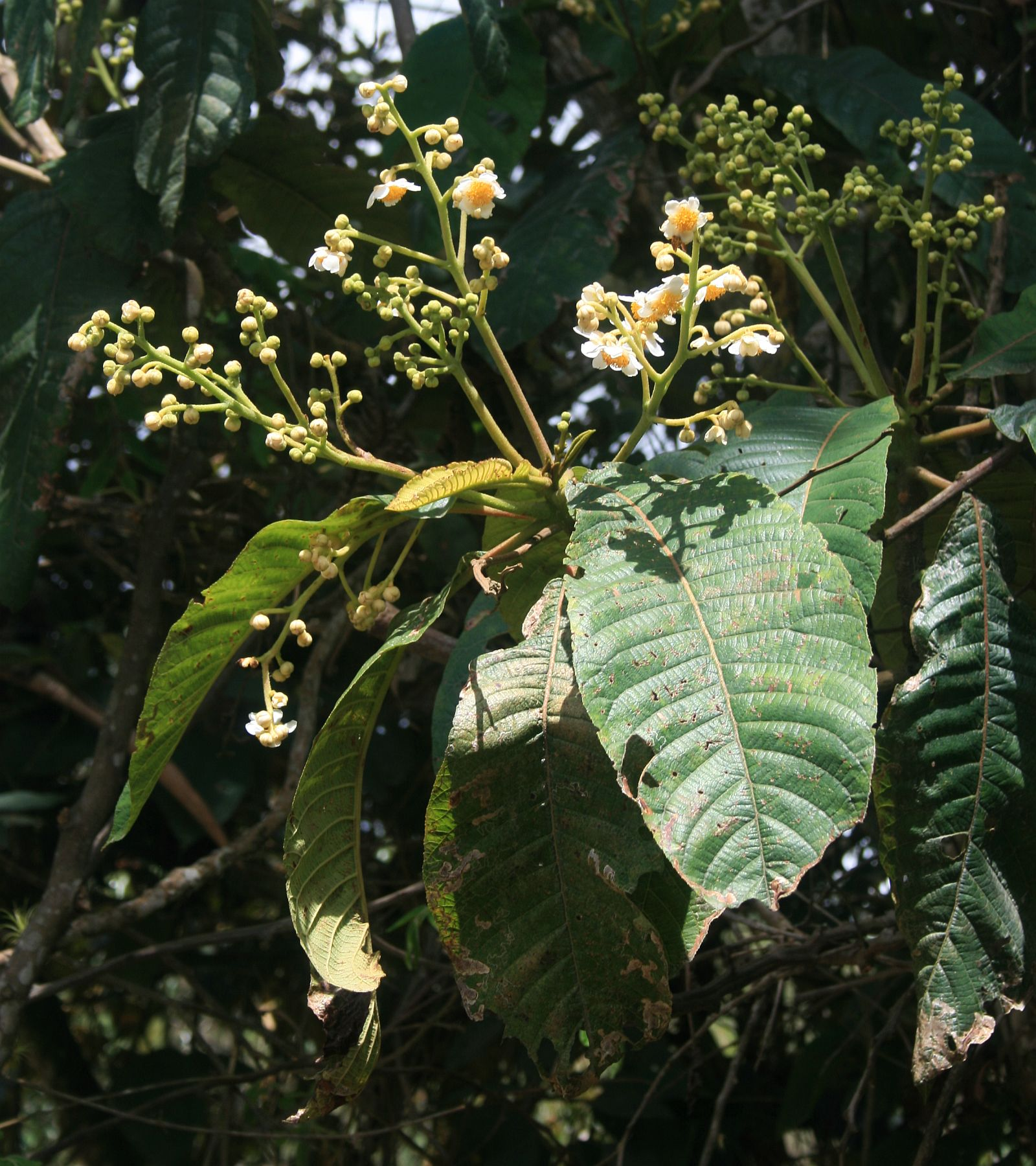 Saurauia aromatica, Strahlengriffelgewächse (Actinidiaceae) – Kolumbien/Colombia: Dpto. Huila, Parque Arqueológico Nacional San Agustín e Isnos, Alto de las Piedras, ca. 4,5 km NNE Isnos, ca. 1820–1830 m